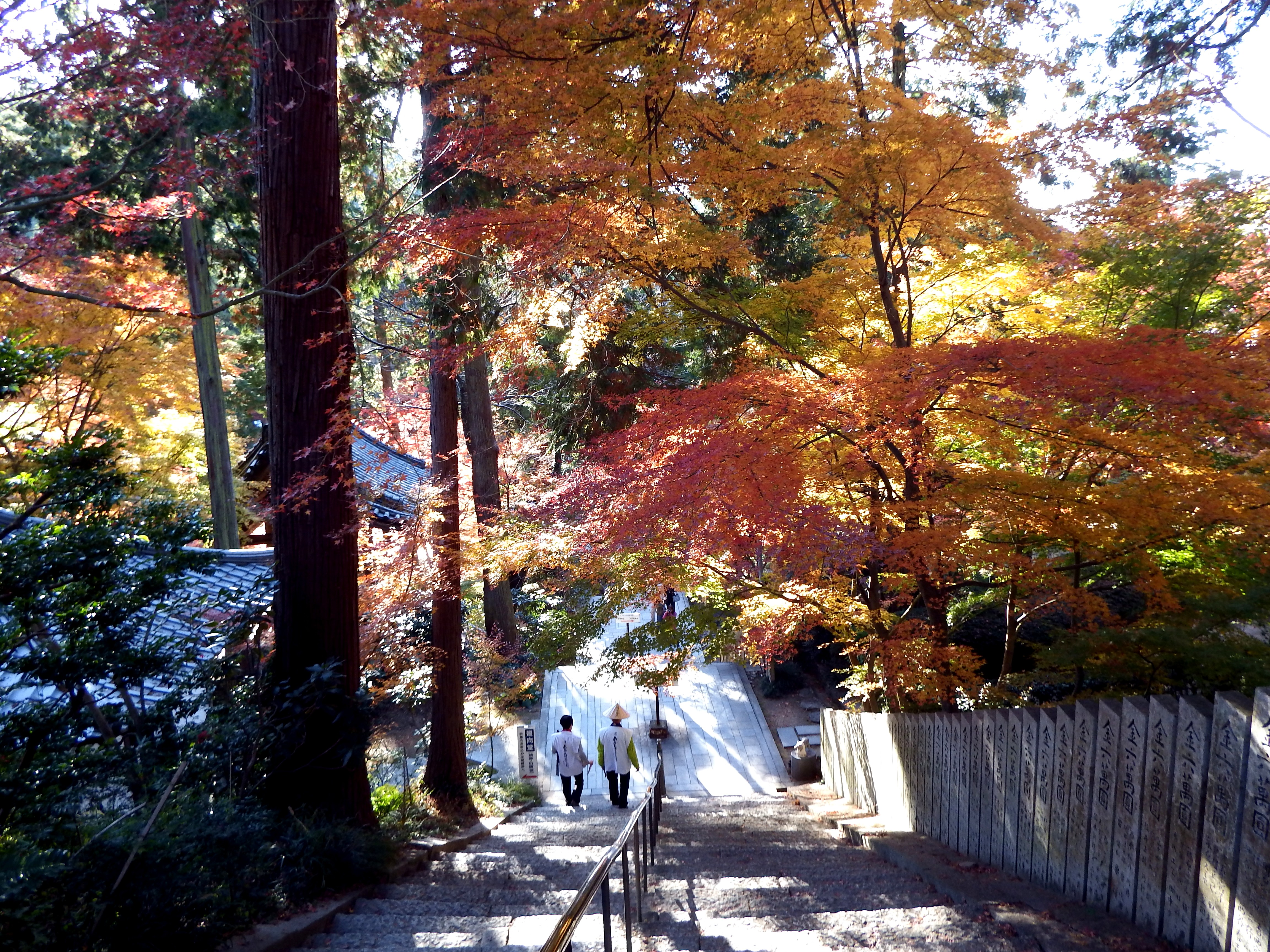 白峯寺の本堂から下る石段